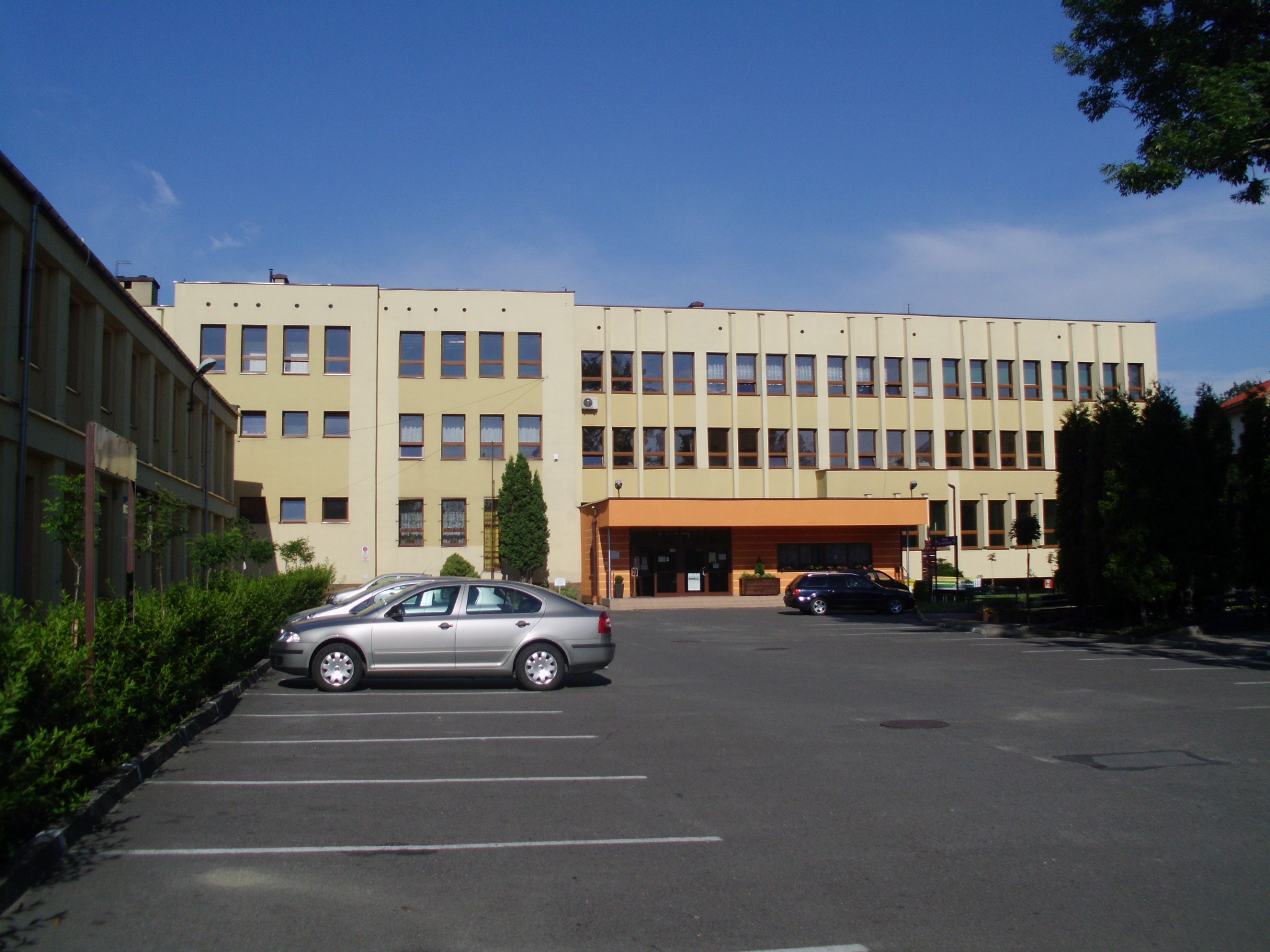 Zespół Szkół Budowlano-Drzewnych im. Armii Krajowej w Żywcu, lipiec 2012